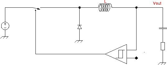 Prinzipielle Topologie eines Hysterese dcdc